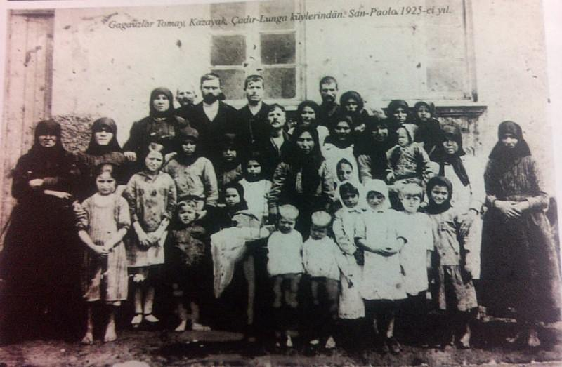 Gagauz: Tomaydan Gagauzlar Braziliyada